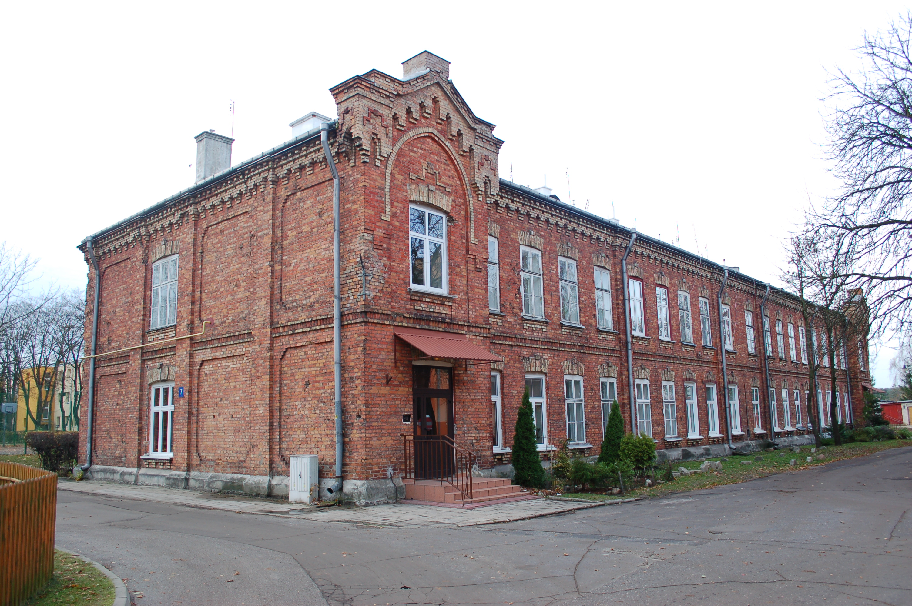 Zagrze barracks